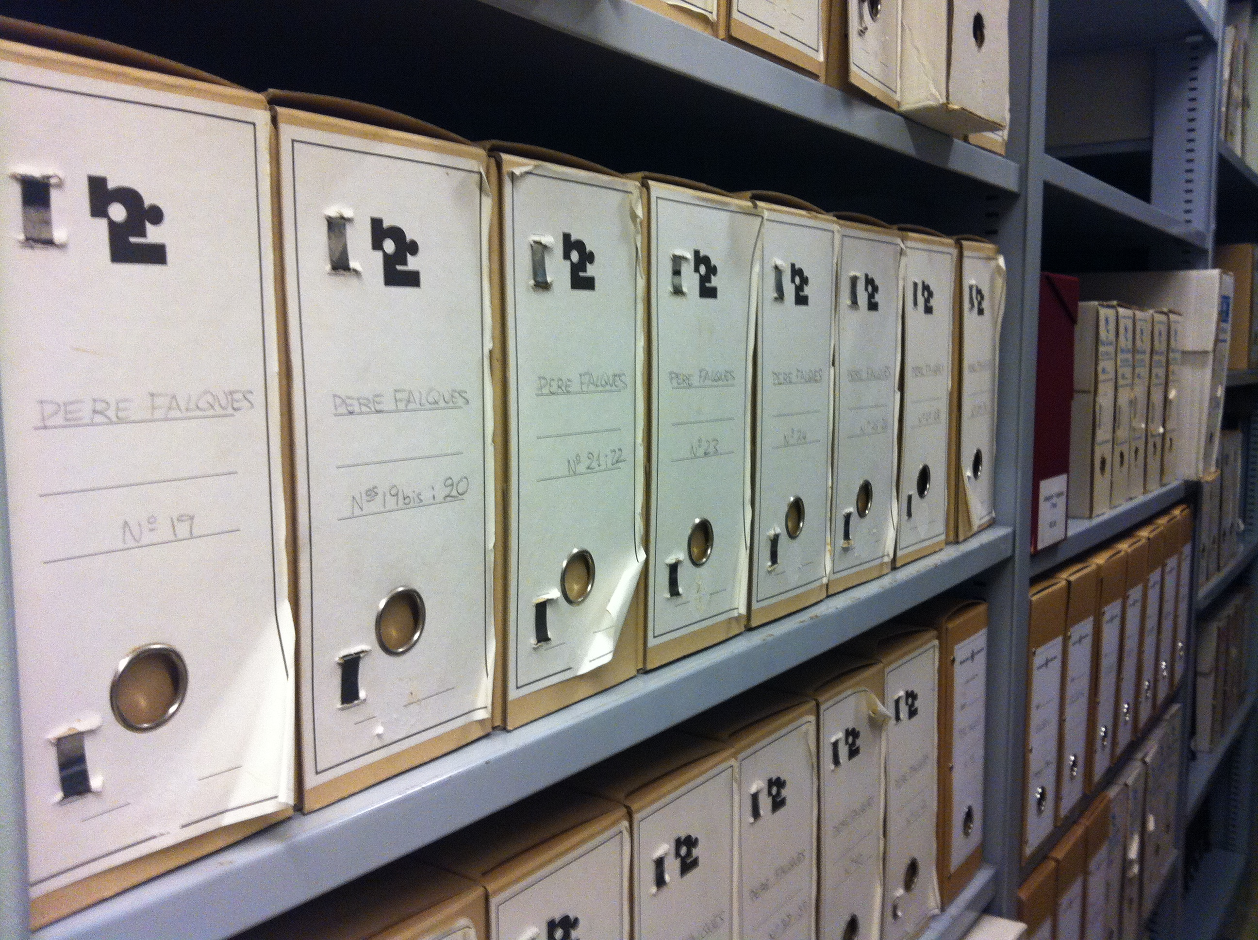 Fons de Pere Falqués a les Zones internes de l'Arxiu Històric de la Ciutat, Barcelona